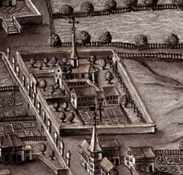 Das Kapuzinerkloster Solothurn Mitte des 17. Jahrhunderts. Ausschnitt aus einem Stadtprospekt von Solothurn. Glasmalerei von Wolfgang Spengler. Als Vorlage diente ein Kupferstich von Sigmund Schlenrit, der seinerseits eine Zeichnung von Urs Küng aus dem Jahr 1653 als Vorlage für seinen Stich verwendete.